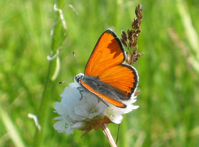 Marche, Ascoli Piceno, Monti Sibillini, Forca Canapine, 1565 m, 2005.06.22 more info (in german)